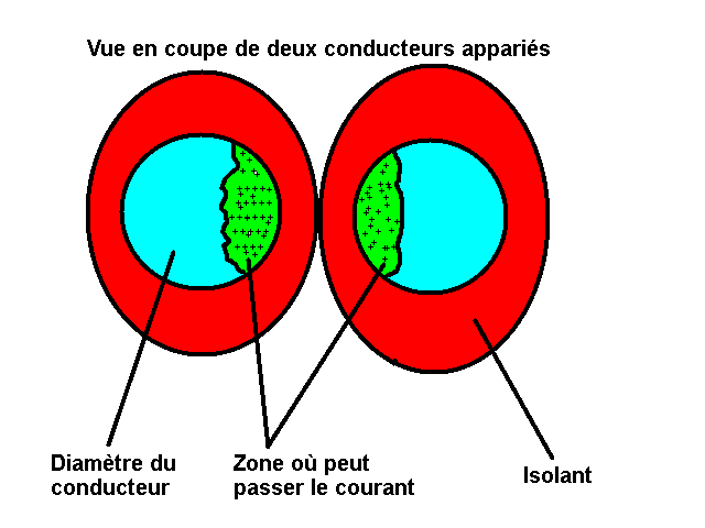 Cette image aide à comprendre l'effet de peau. Licence : Domaine public Source : Création personnelle